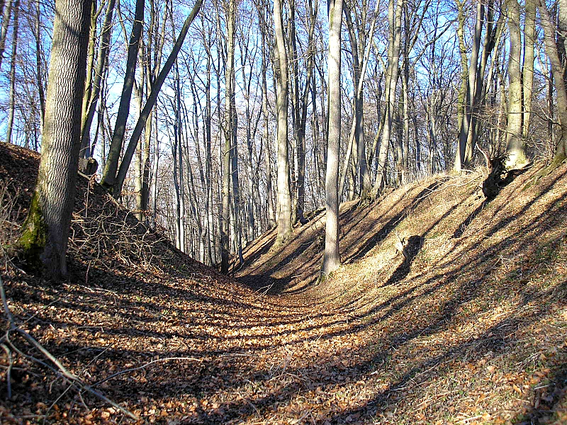 Hochmittelalterlicher Burgstall Mühlhausen (Gemeinde Affing, Landkreis Aichach-Friedberg, Bayerisch-Schwaben). Der Graben der Hauptburg nach Nordwesten. Eigene Aufnahme, Feb. 2008 / High Middle Ages Muehlhausen castle near Affing (Landkreis Aichach-Friedberg, Bavaria, Germany). The moat of the central castle, looking north west. Own photo, Feb. 2008